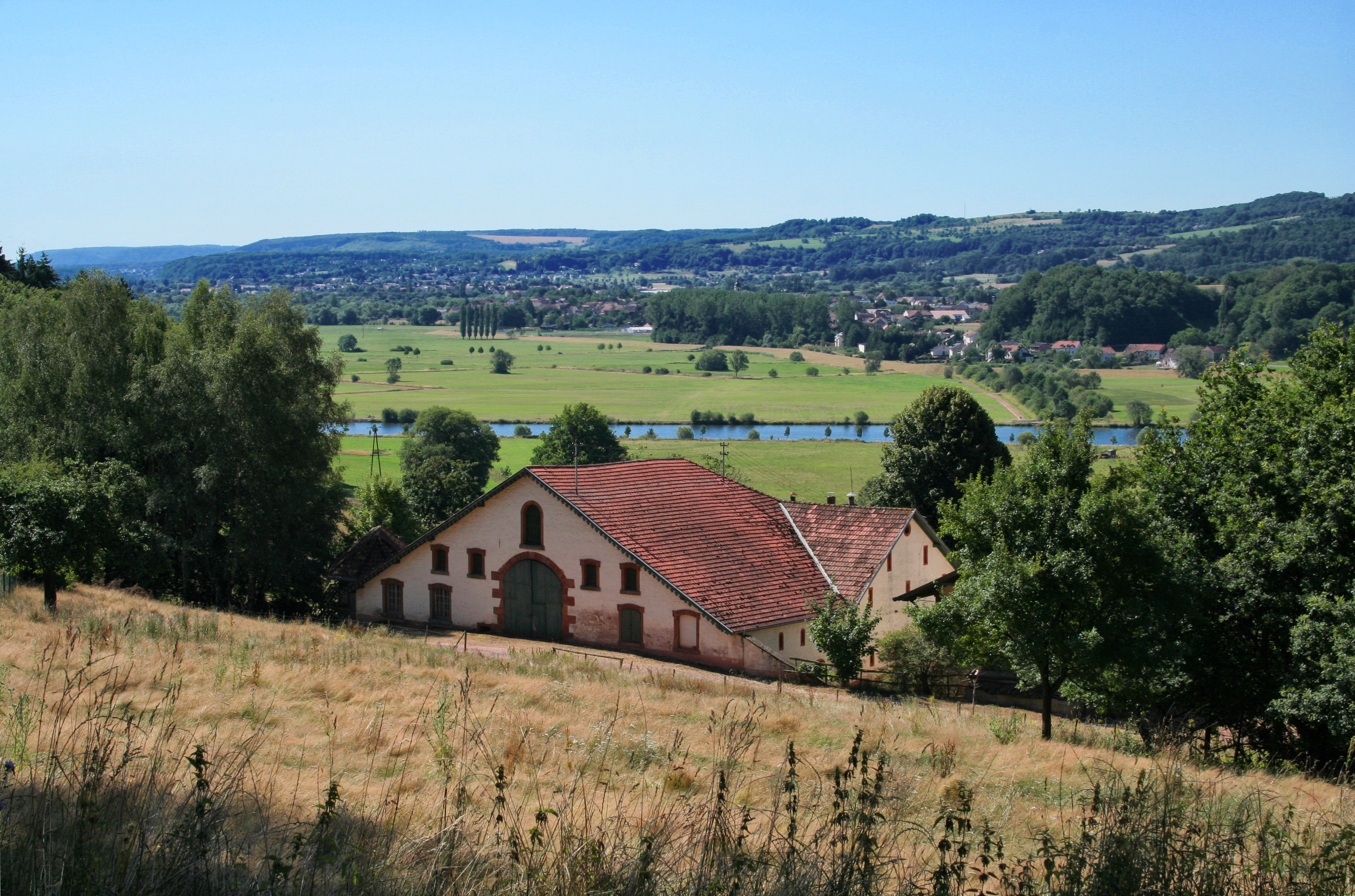 Hofgut Sankt Gangolf in Mettlach, im Hintergrund die Saar